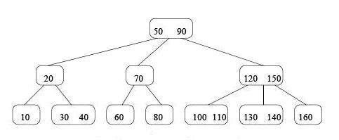 primer ejemplo para arbol 2-3